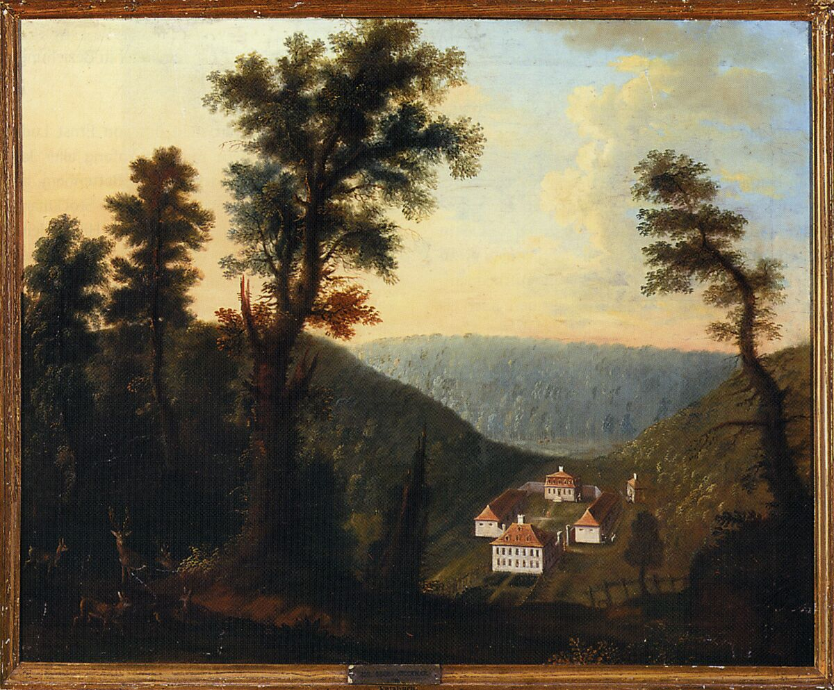 „Ansicht des Jagdhauses Katzenbach, 18. Jahrhundert“ (Jagdschloss Katzenbach) Standort: Jagdmuseum Kranichstein